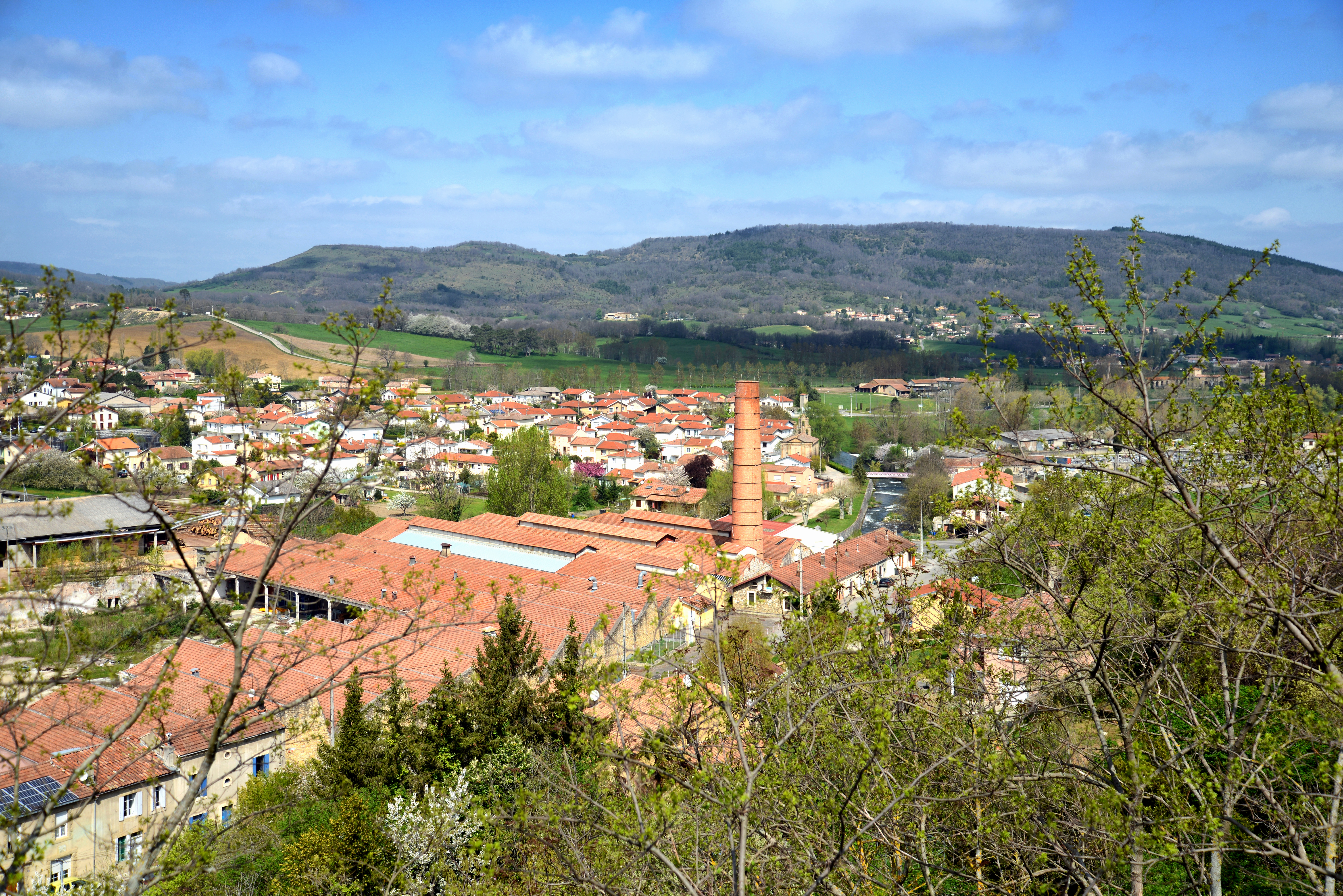 Laroque-d'Olmes (Ariège, Midi-Pyrénées, France) - Vue du village depuis le Castella.